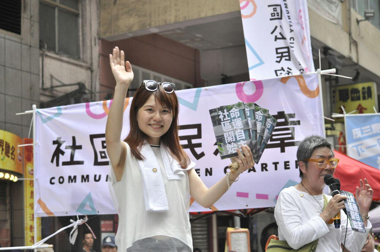 中文（香港）: 楊雪盈在七一大遊行為社區公民約章站台